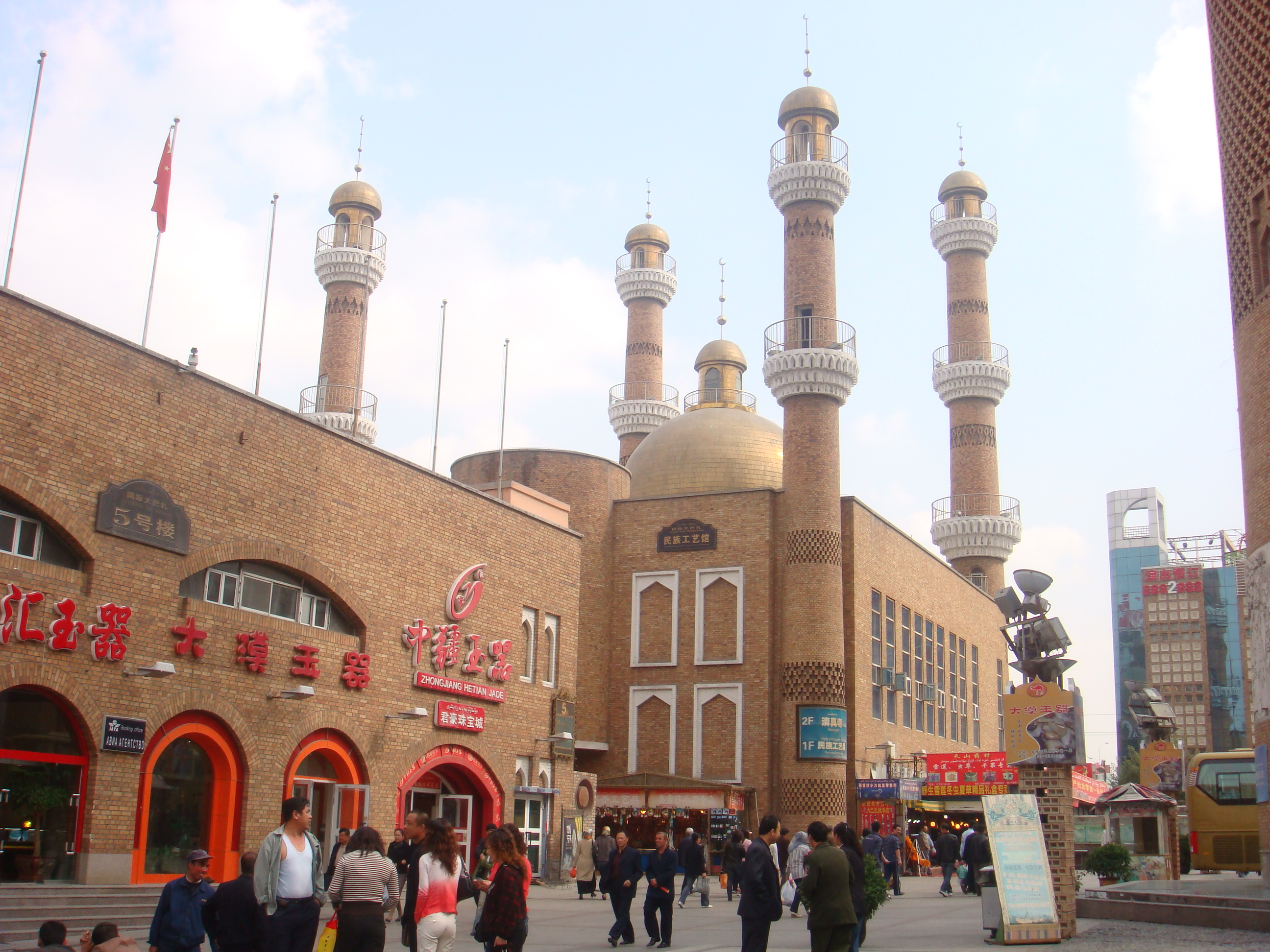 大巴扎 China Xinjiang Urumqi Welcome you to tour the, Китай Синьцзяна Урумчи приветствовать Вас на экскурсию, الصين ترحب زيارتك لاورومتشى فى شينجيانغ, 中国新疆のウルムチへの訪問を歓迎する, 中国新疆乌鲁木齐欢迎您来观光旅游